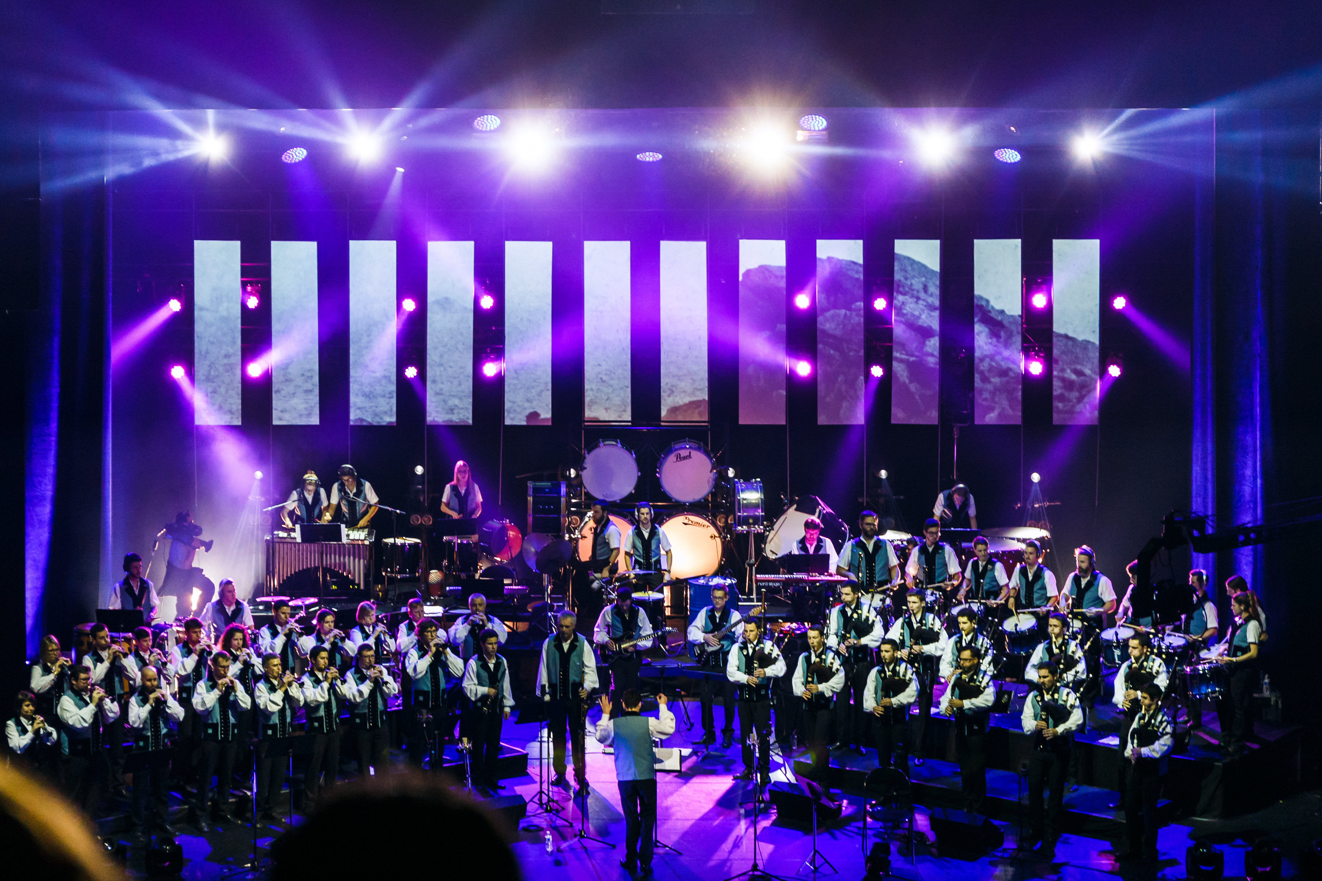 Le bagad Melinerion de Vannes sur la scène de L'Olympia à Paris avec sa superproduction Contrechamp le 5 février 2017.